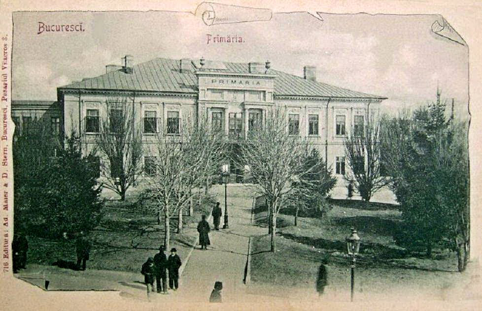 Vechiul sediu al Primăriei Bucureștiului (România) din Casa Hagi Moscu situat pe strada Colţei, cam în locul Teatrului Naţional de astăzi. Clădirea a fost demolată în 1912.